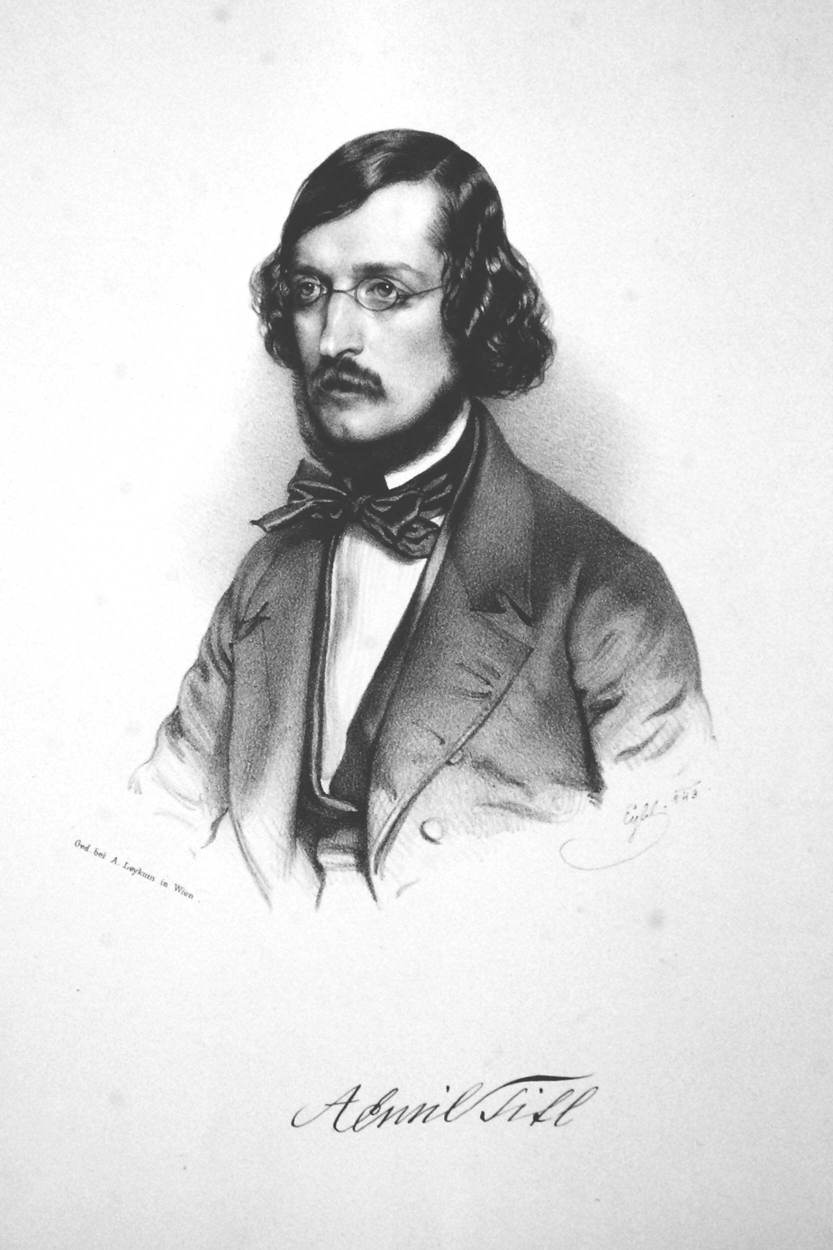 Anton Emil Titl (11809-1882), österreichischer Komponistr. Lithographie von Franz Eybl, 1843